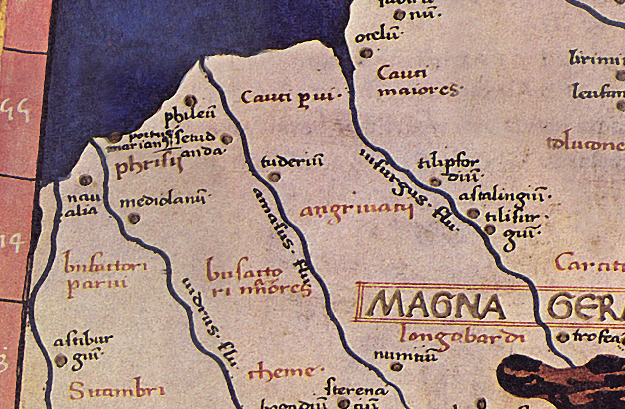 Die Ortsbezeichnung "NABALIA" (hier: naualia), Detailbild von der Karte zur Germania magna.